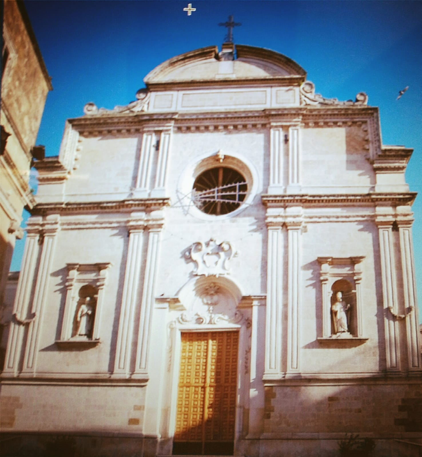 IGLESIA MATRIZ LATIANO